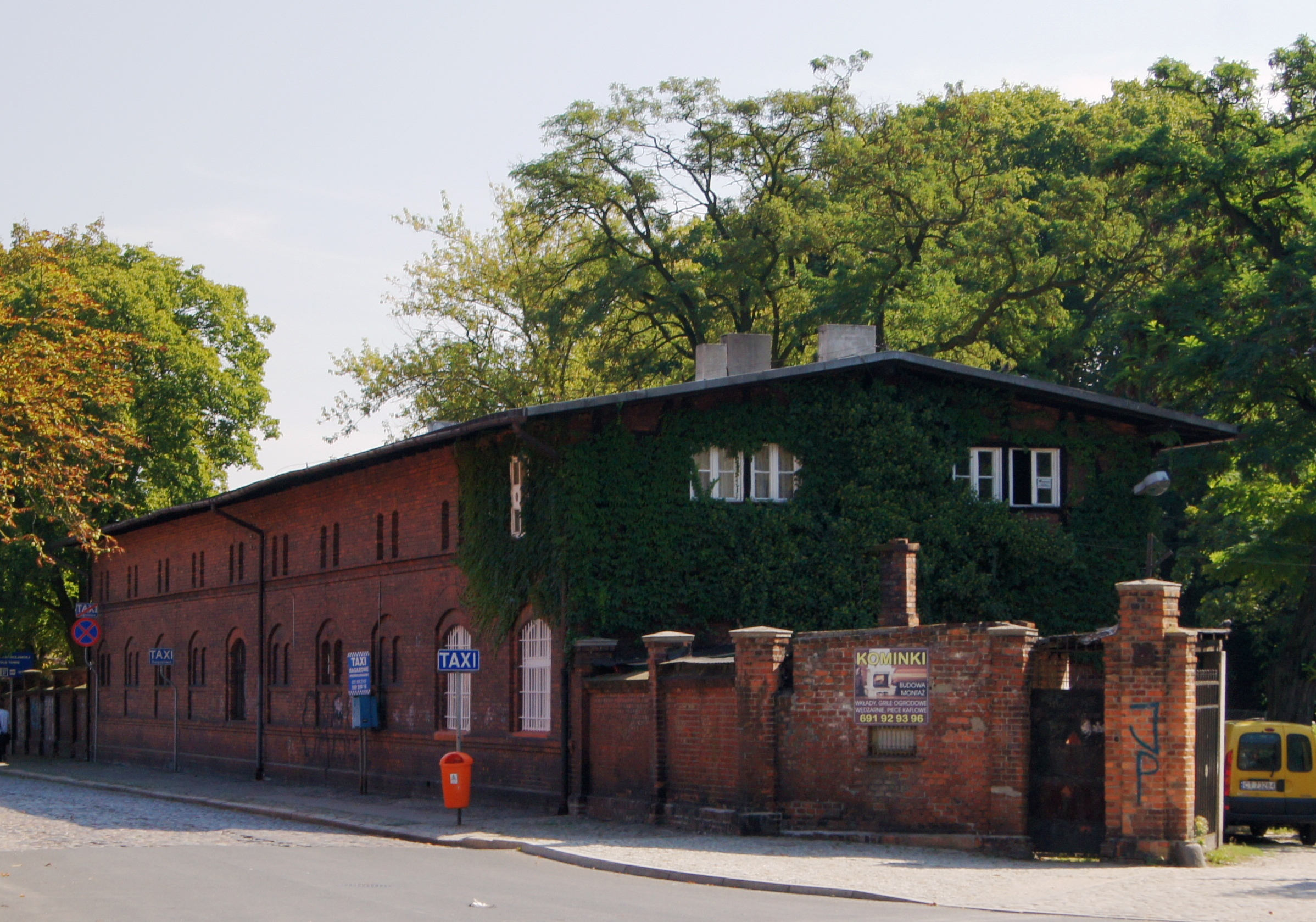 Toruń, ul. św. Jakuba 5 - Twierdza Toruń: bastion I „Menniczy”, 1900 (obwarowania, mur i ziem., 2 prochownie, schron na wale), XVII-XX: magazyn (zabytek A/703/1-10)